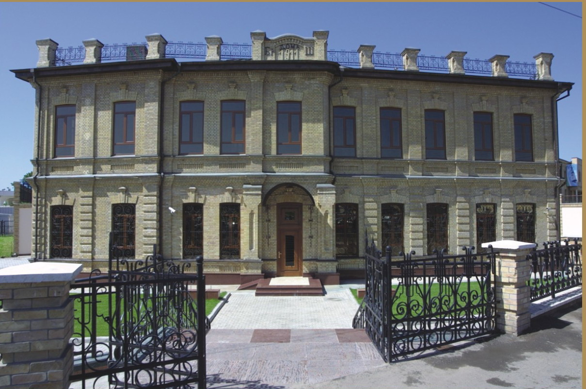 Фото 2007 года